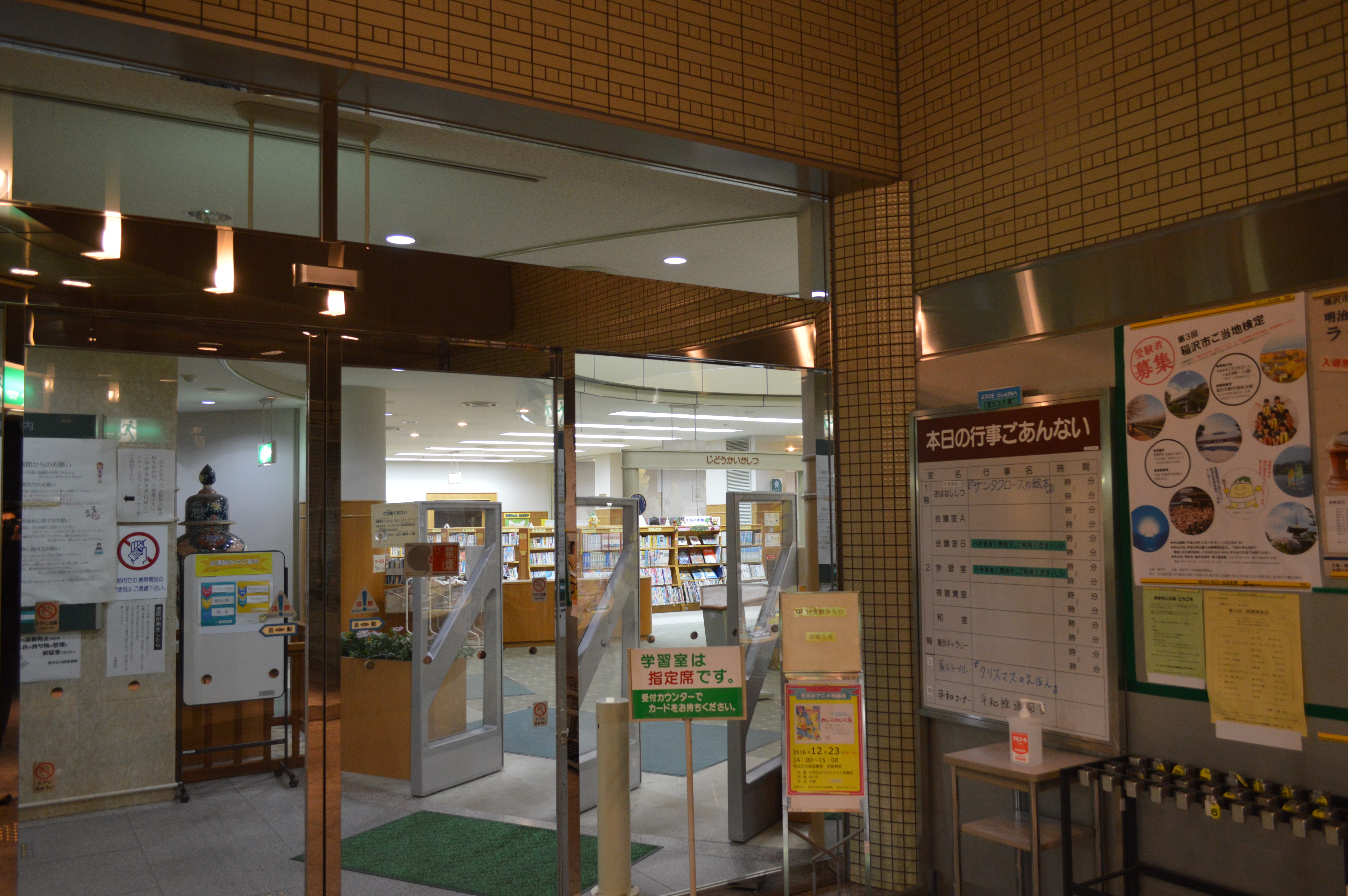 稲沢市祖父江の森図書館。稲沢市図書館のひとつ。